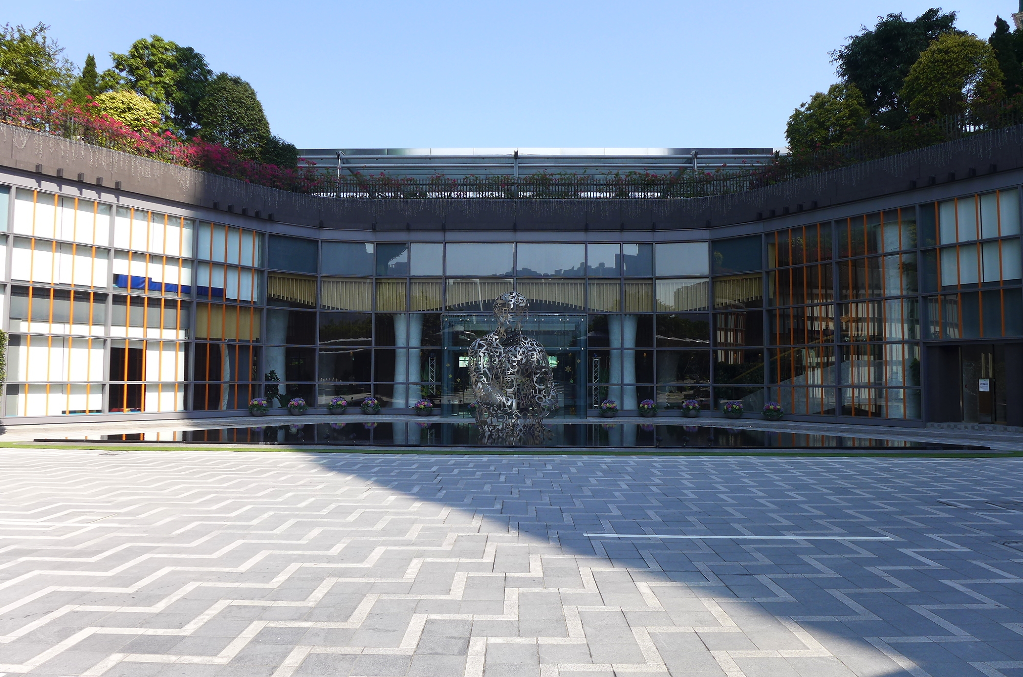 Double Club Entrance